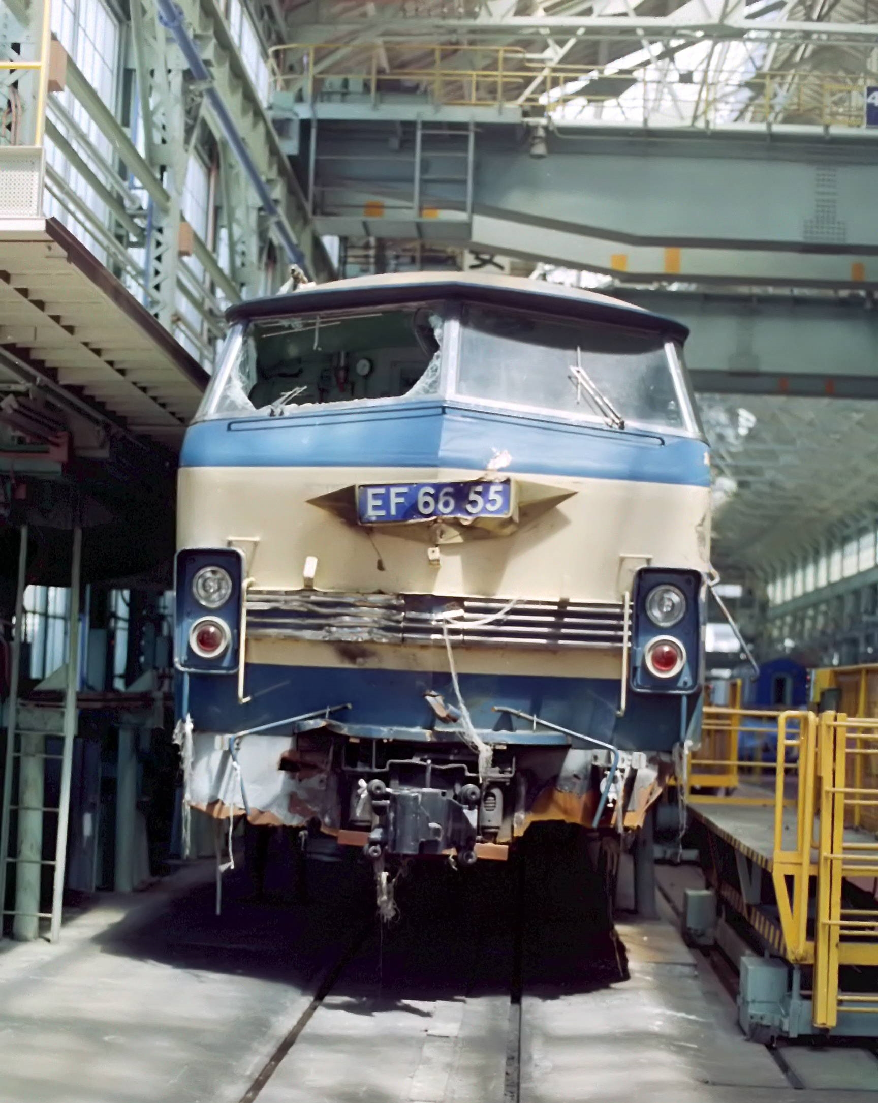 寝台特急「さくら」衝突事故で大破したEF66 55